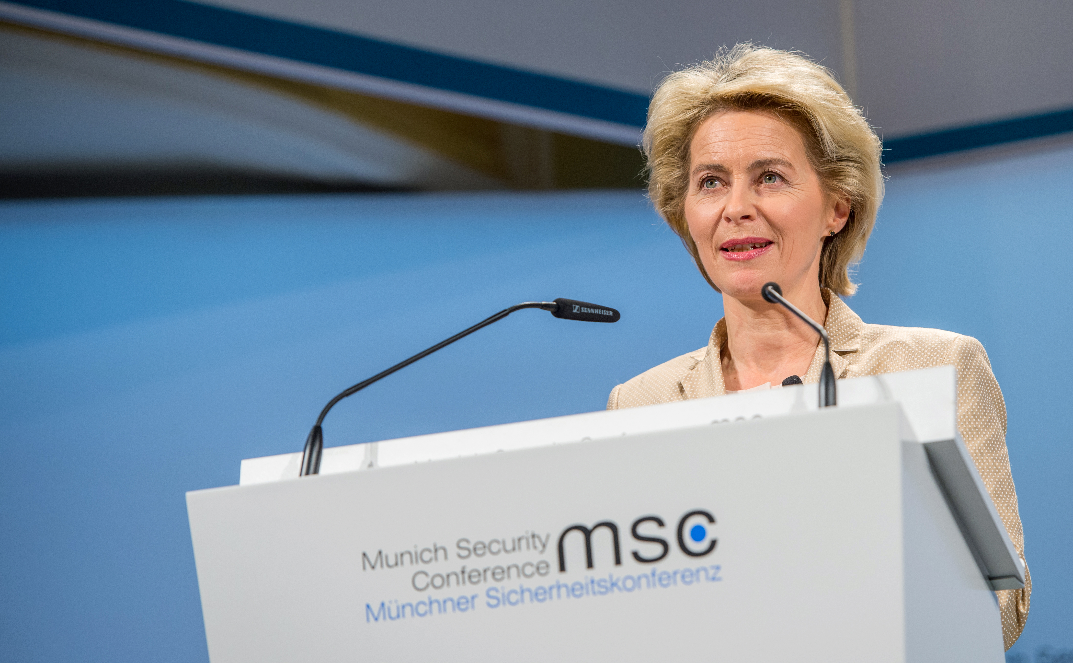 Bundesverteidigungsministerin Ursula von der Leyen bei ihrer Eröffnungsrede zur 51. Münchner Sicherheitskonferenz